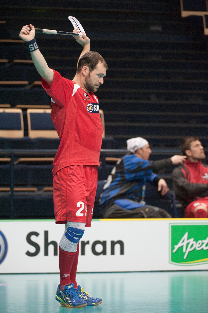 Sascha Weber in Action